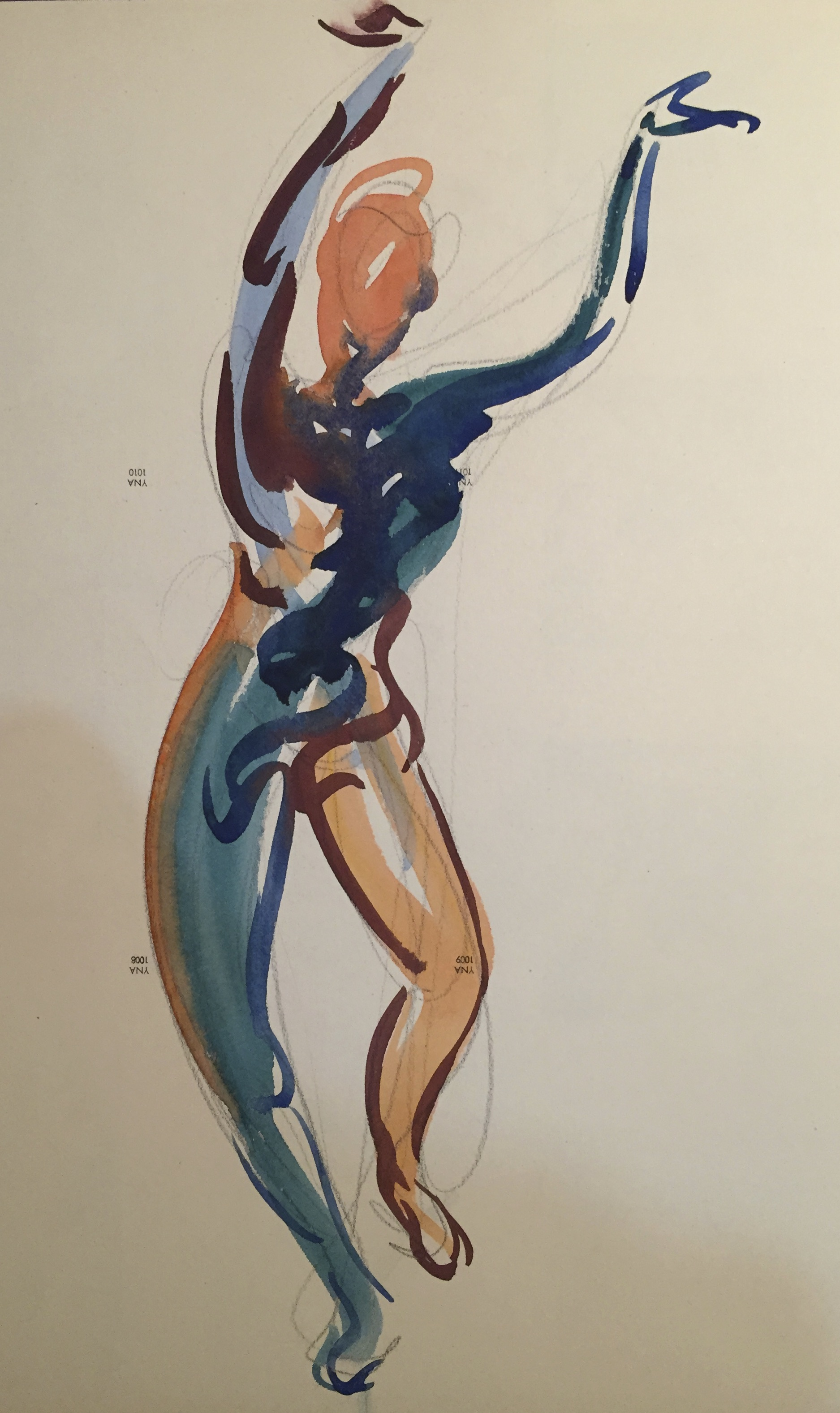 Aquarel·la sobre paper